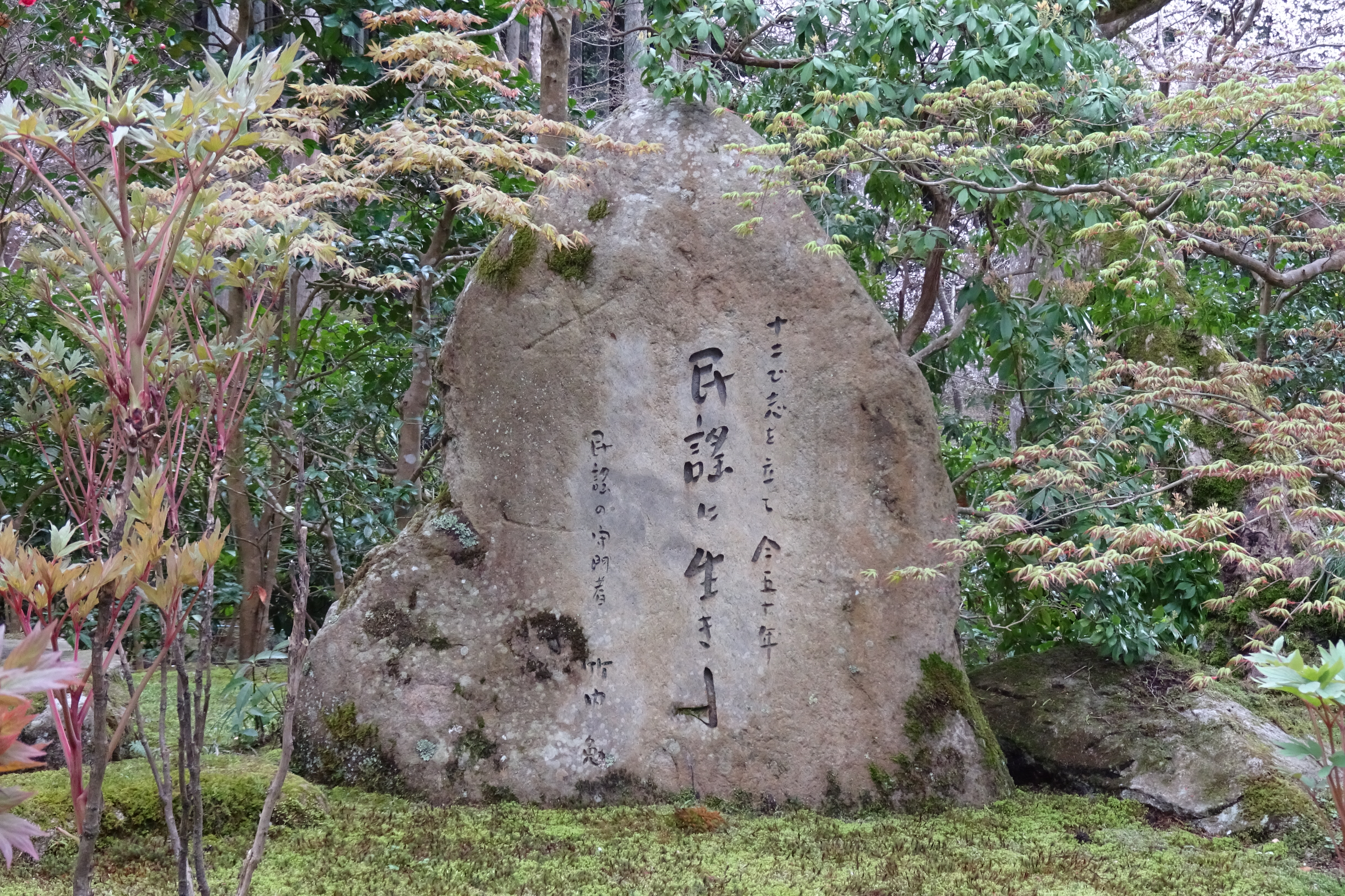 三千院（京都市左京区）境内の石碑